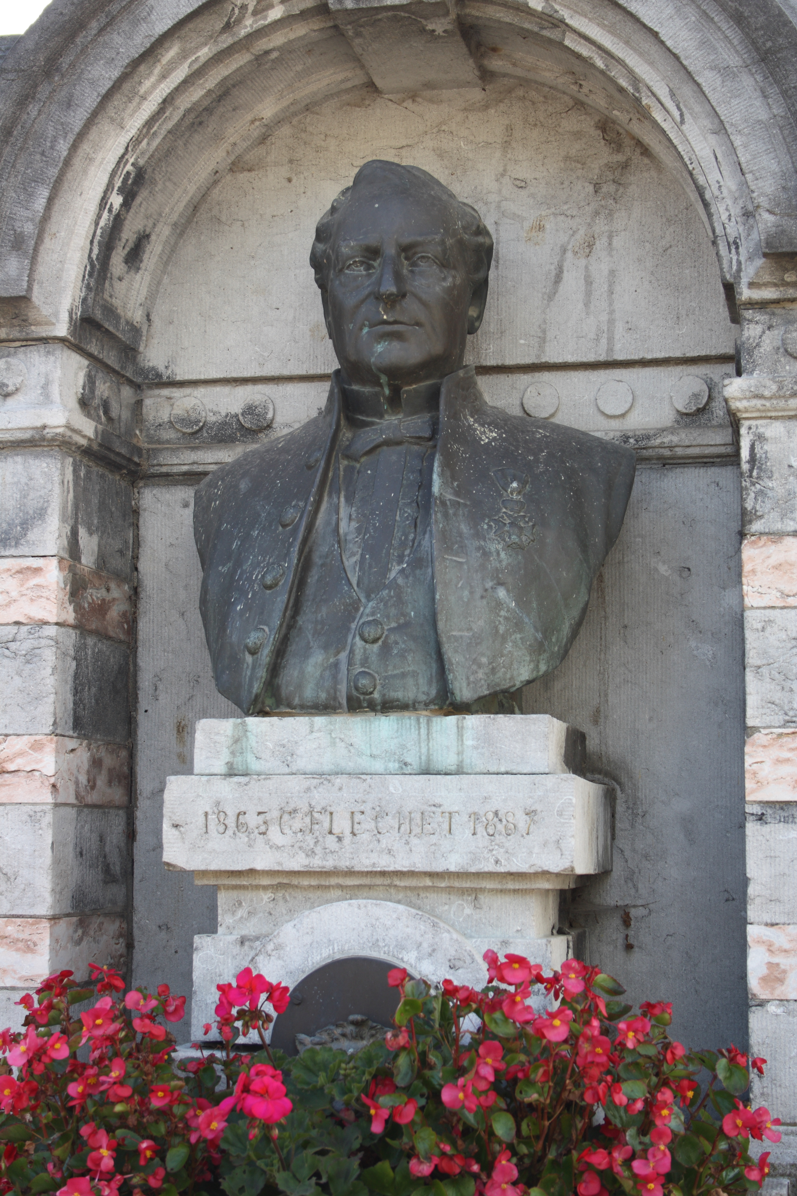 Denkmal in Warsage, einem Ortsteil von Dalhem in Belgien